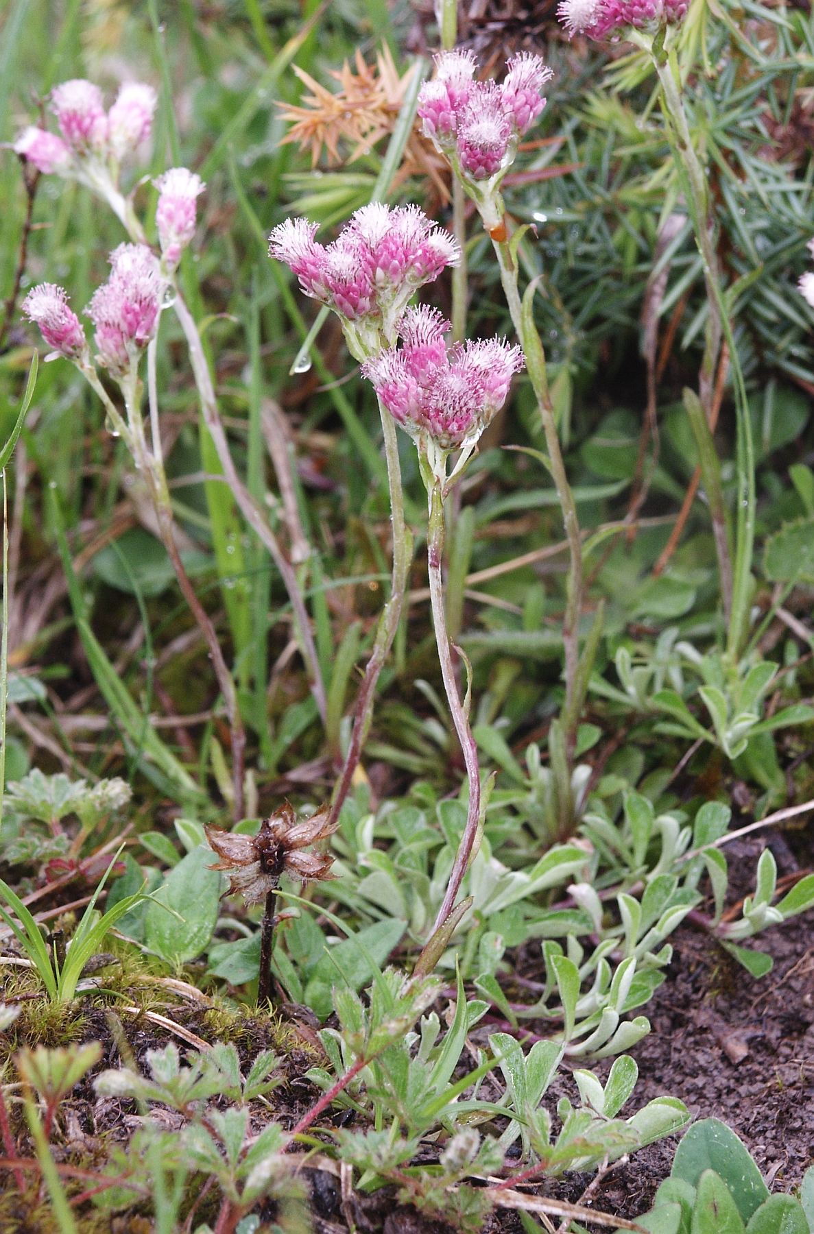 Antennaria dioica, Frankenhöhe, Germany